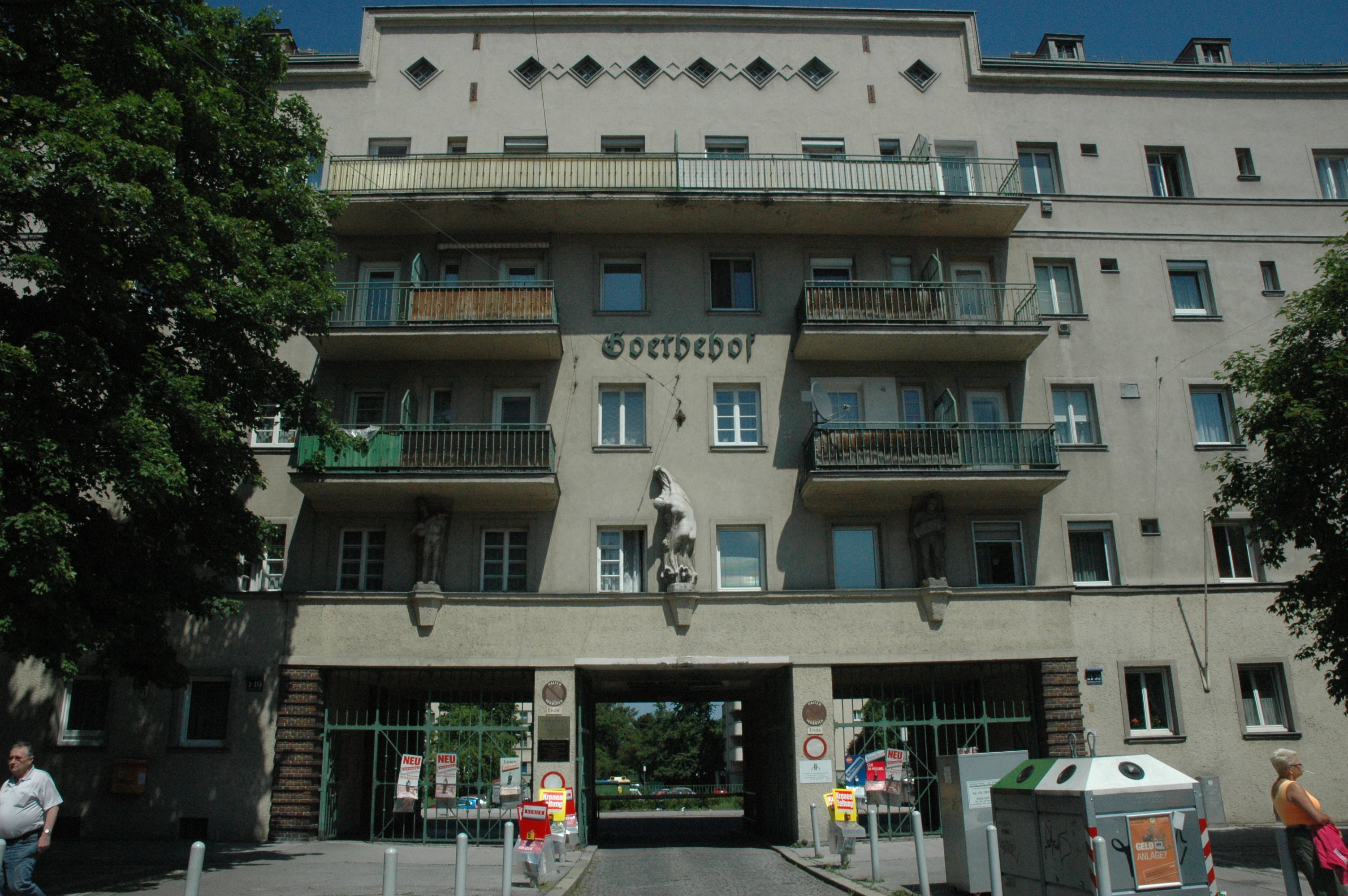 Eingang zum Goethehof in Kaisermühlen